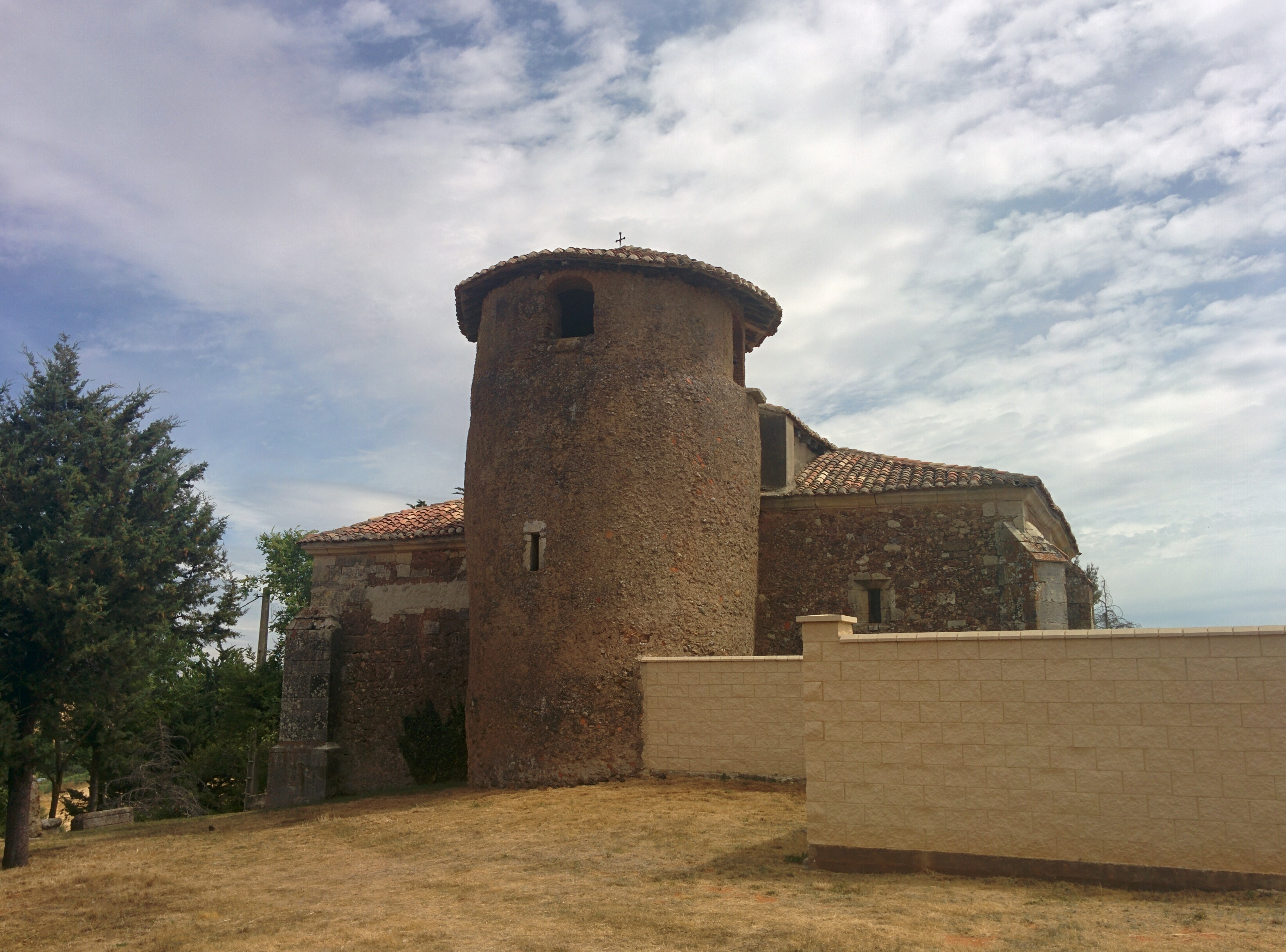 Iglesia de San Julián y Santa Basilisa, en Micieces de Ojeda (Palencia, España).